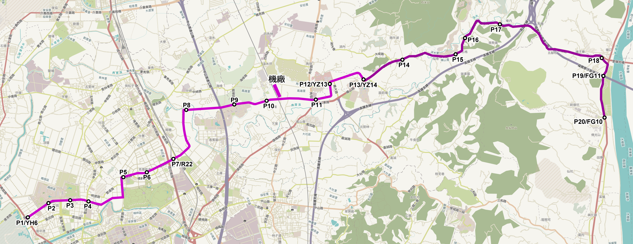 2014年版本的燕巢線